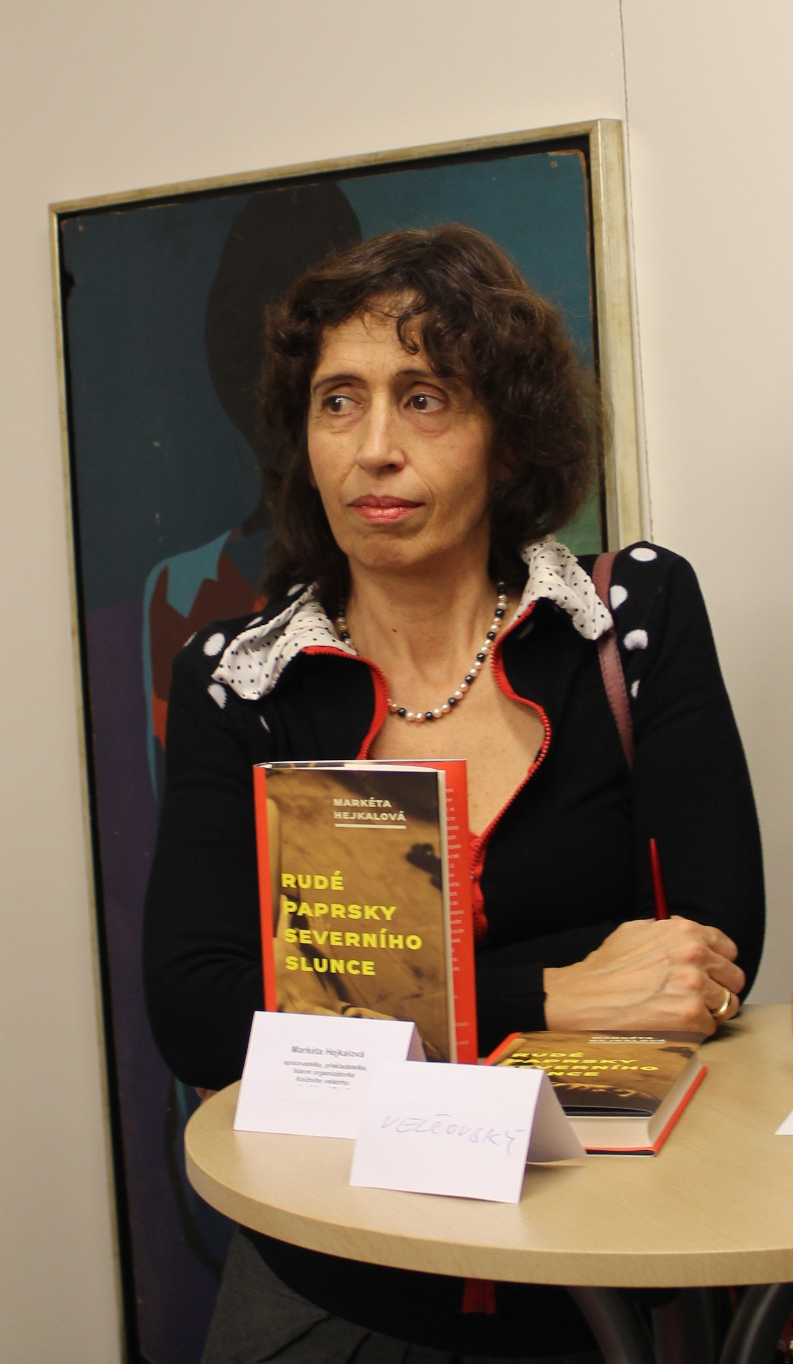 Markéta Hejkalová na Maxiautogramiádě konané v pražské galerii Mánesova 54 péčí Vratislava Ebra.